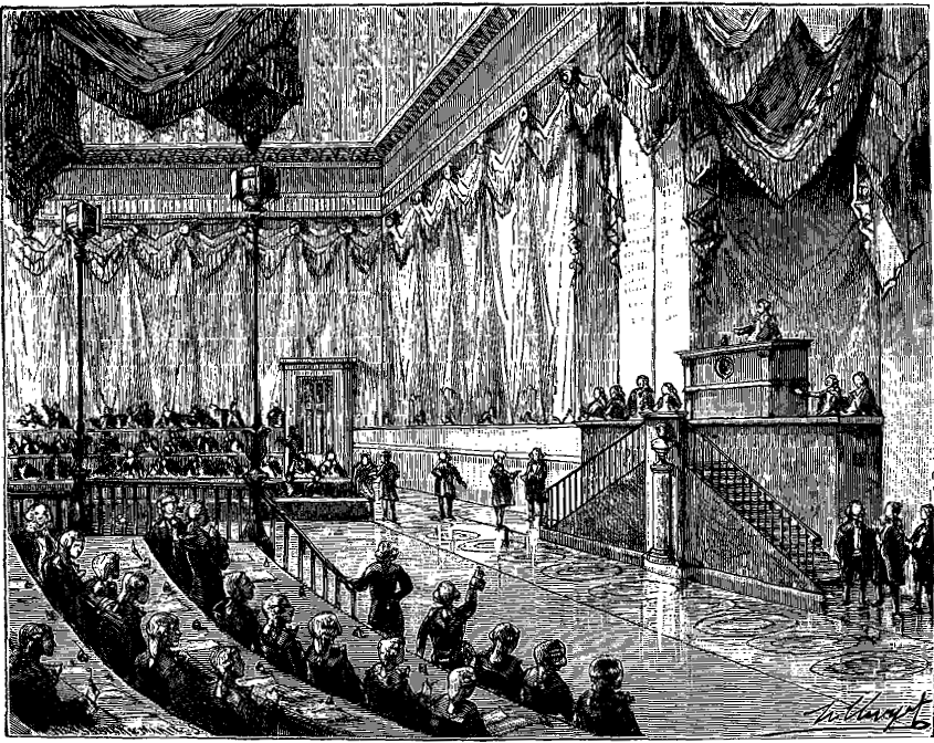 séance de la Convention extrait de La France illustrée, géographie, histoire, administration, statistique, etc., tome I, par V.-A. Malte-Brun.